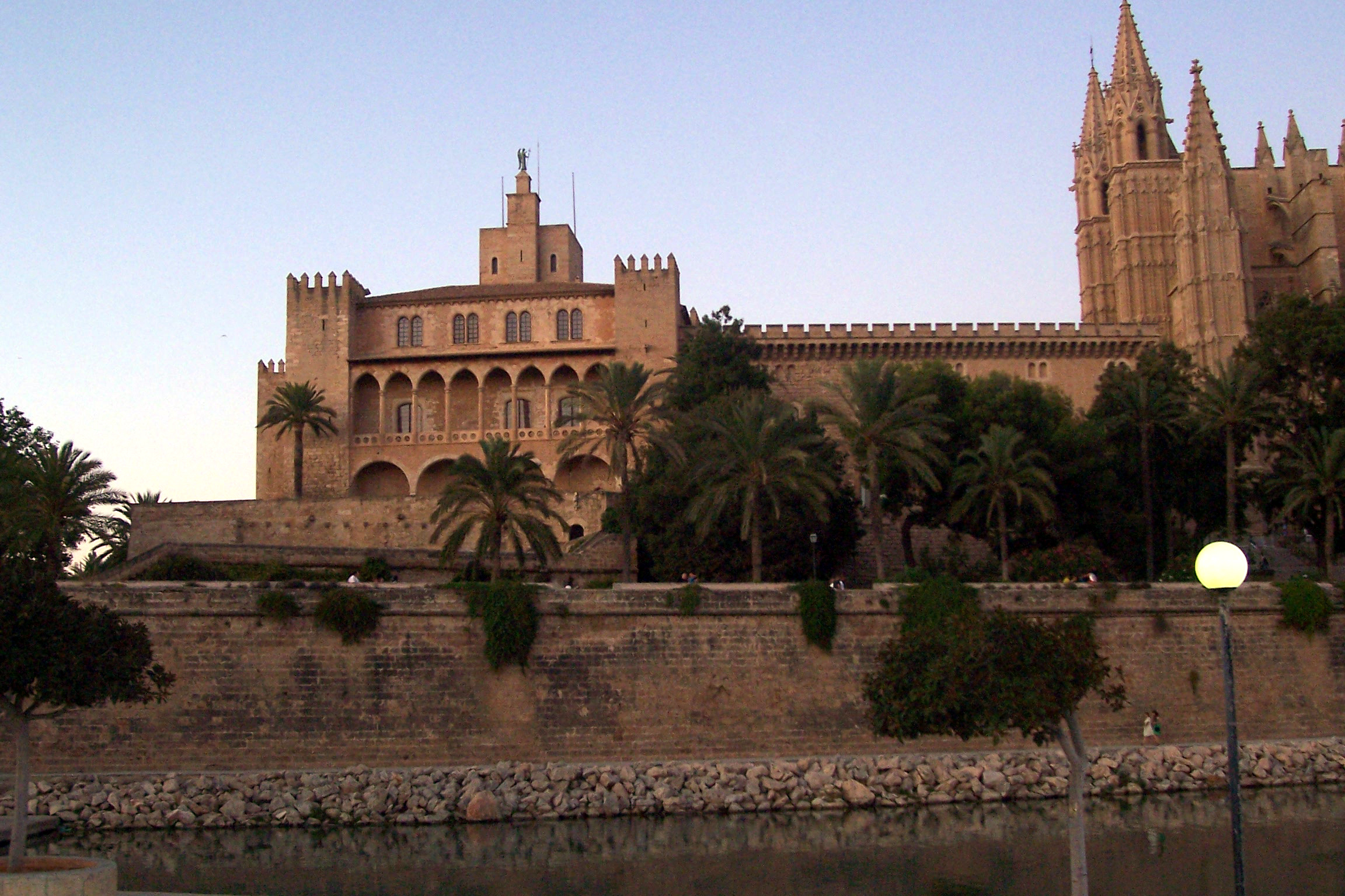 Castell de l'Almudaina (Palma, Illes Balears)/ L'Almudaina Castle (Palma, Balearic Islands)